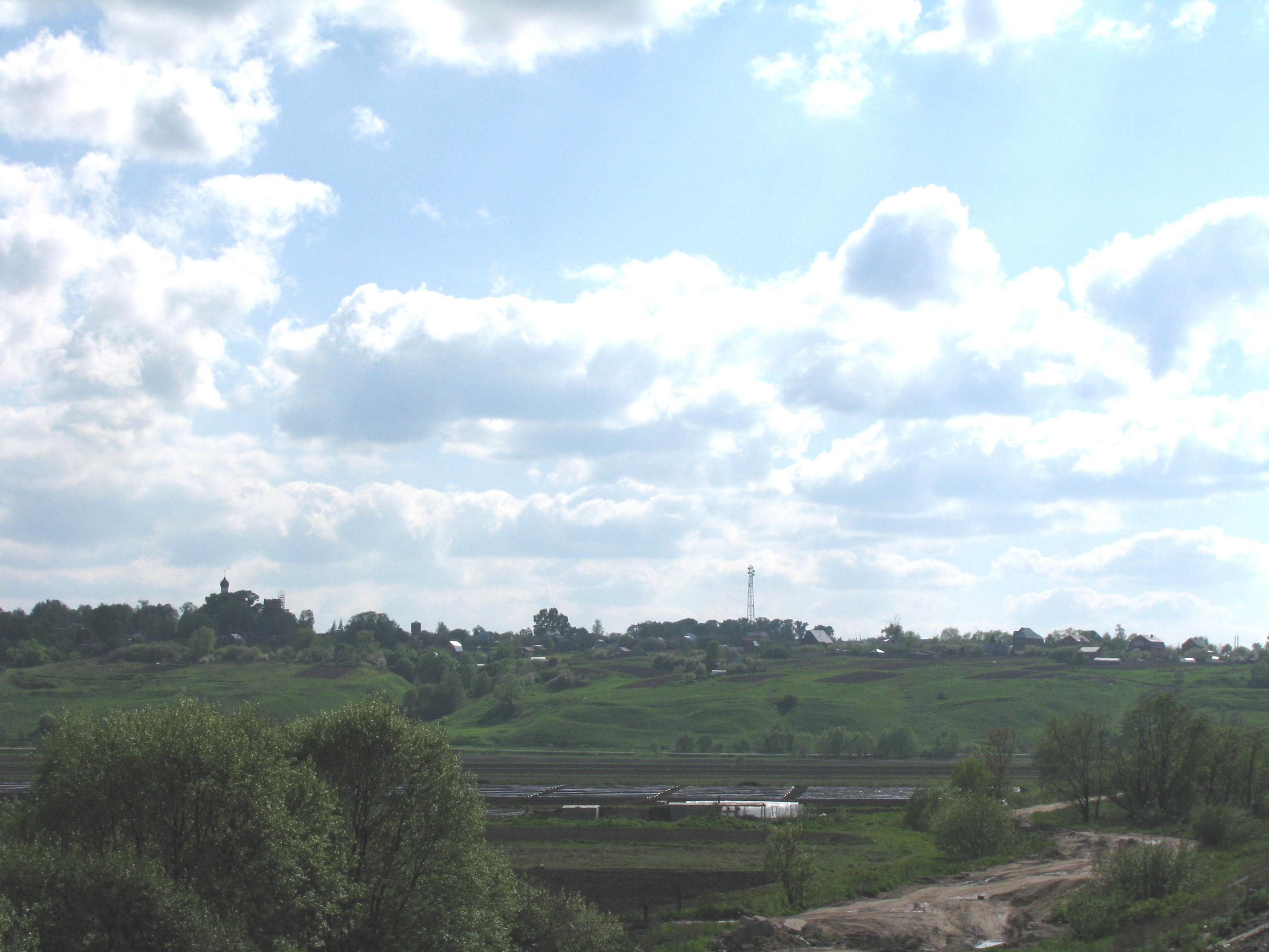 Lipitsy village, view_from_Oka_river (Serpukhov District, Moscow Region)/ Липицы, вид со стороны реки Ока (Серпуховский район Московской области)